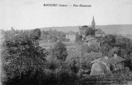 Succieu (Isère, France) vue générale